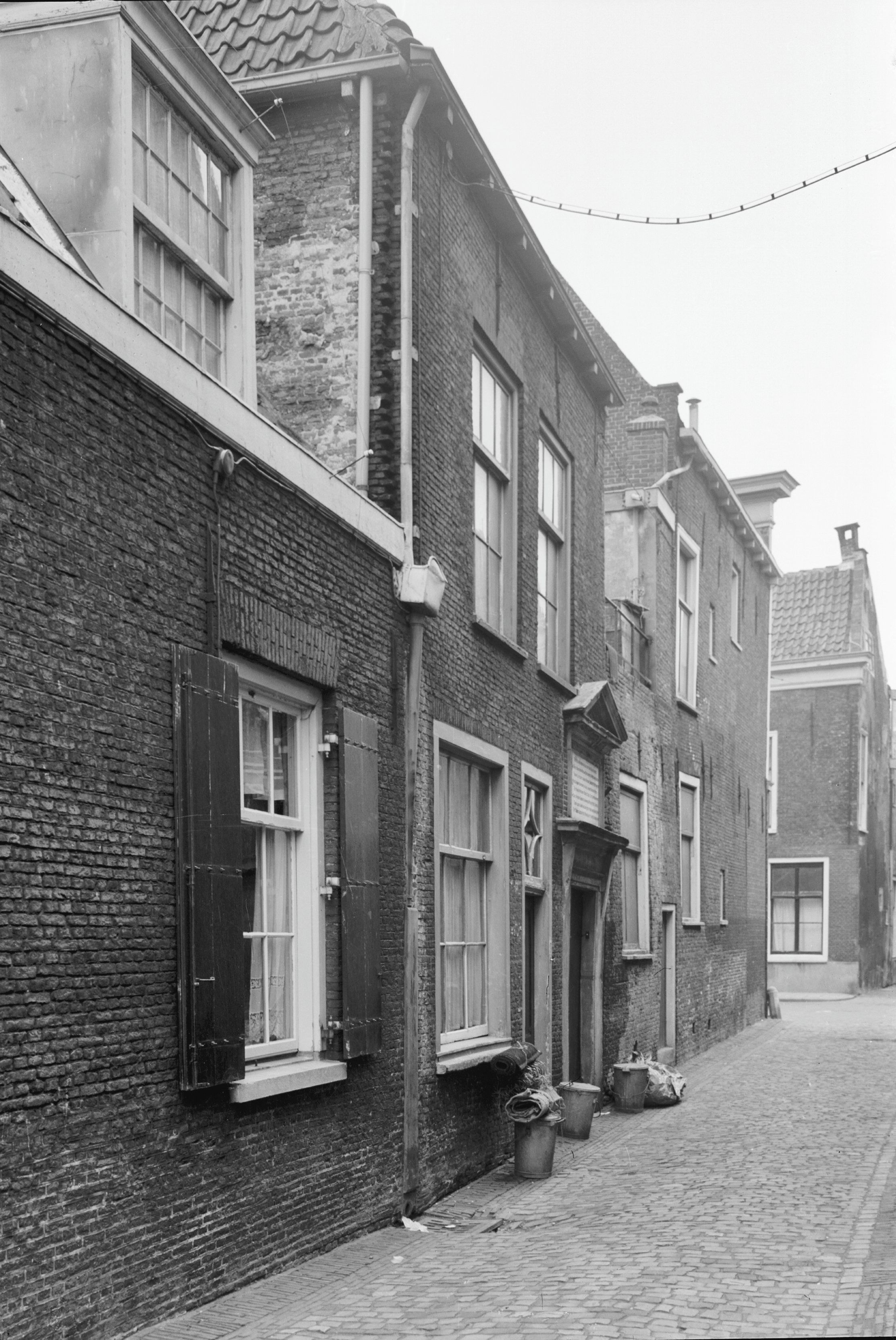 gevel